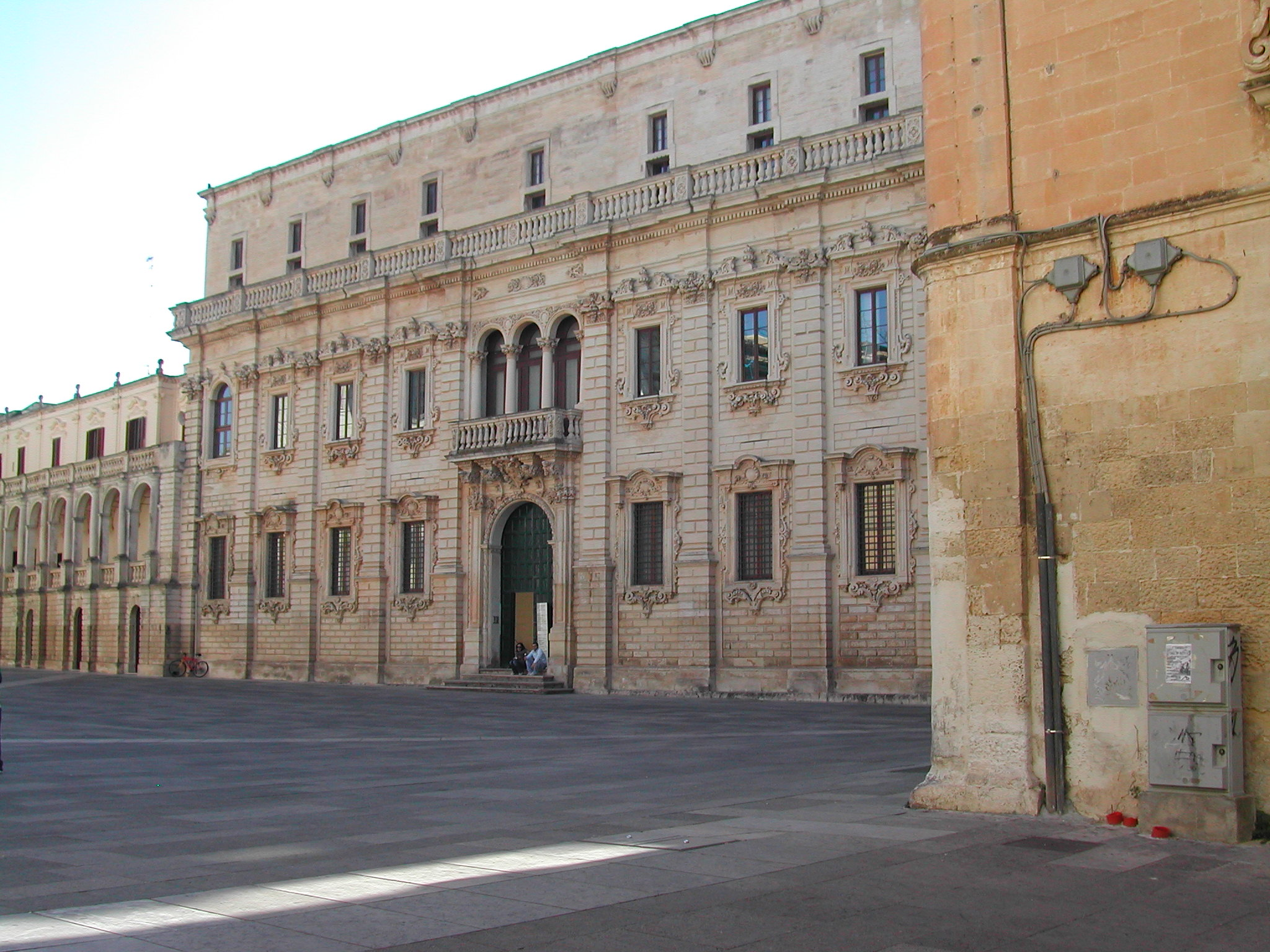 "Episcopio - Lecce - Italy"